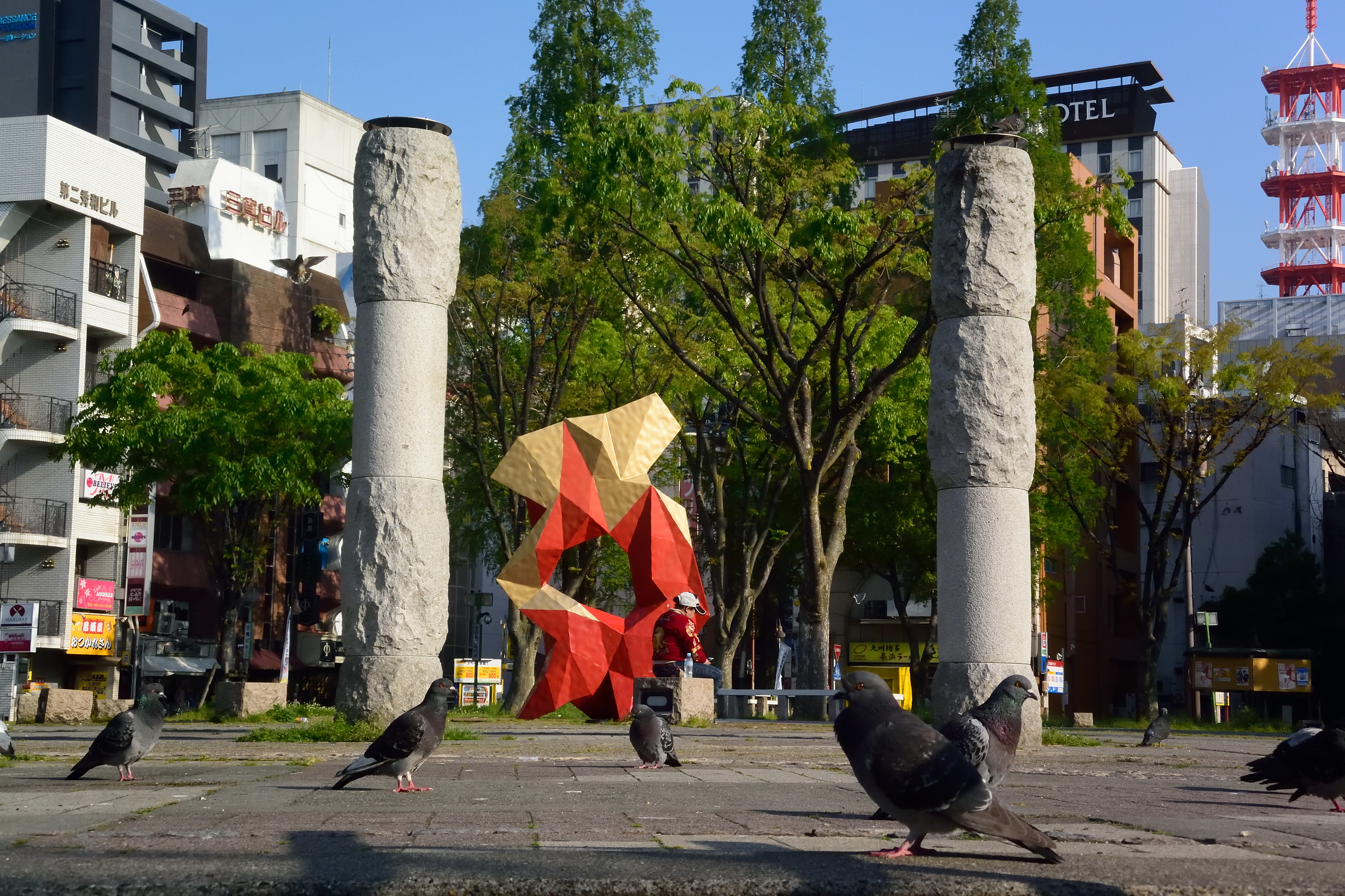 池田公園 (名古屋市中区栄四丁目)